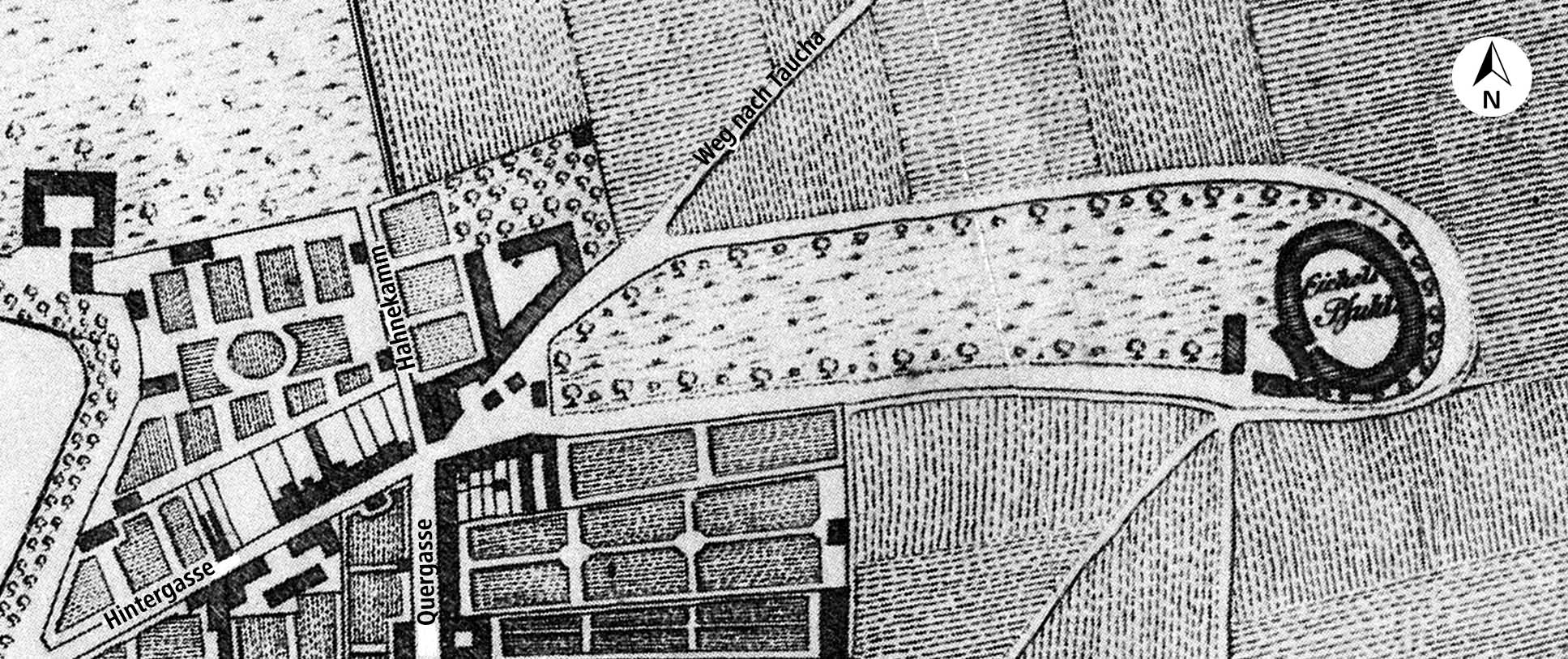 Egelspfuhl in Leipzig (später Milchinsel) auf einem Plan aus dem Jahr 1781